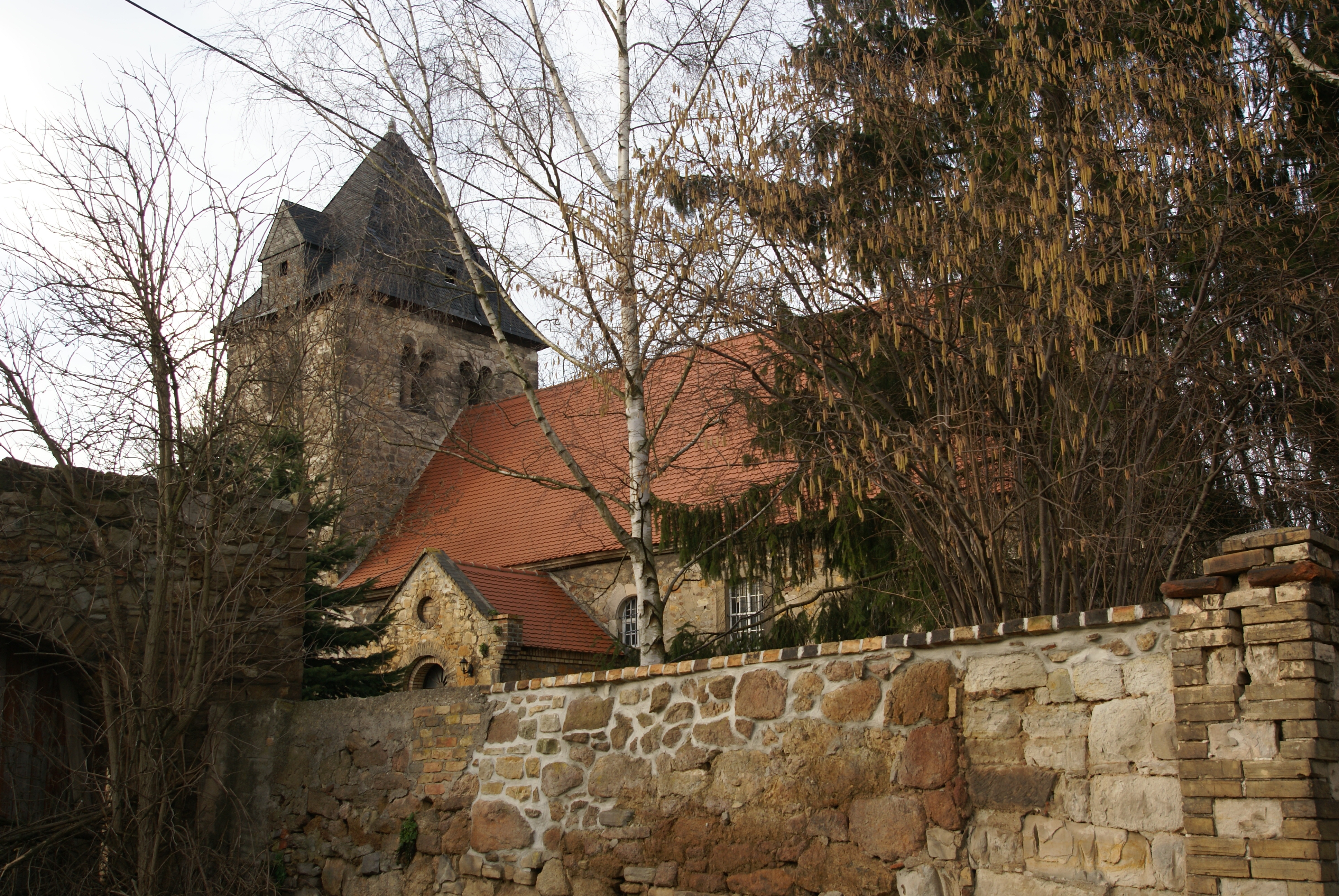 die Dorfkirche von Schiepzig bei Salzmünde